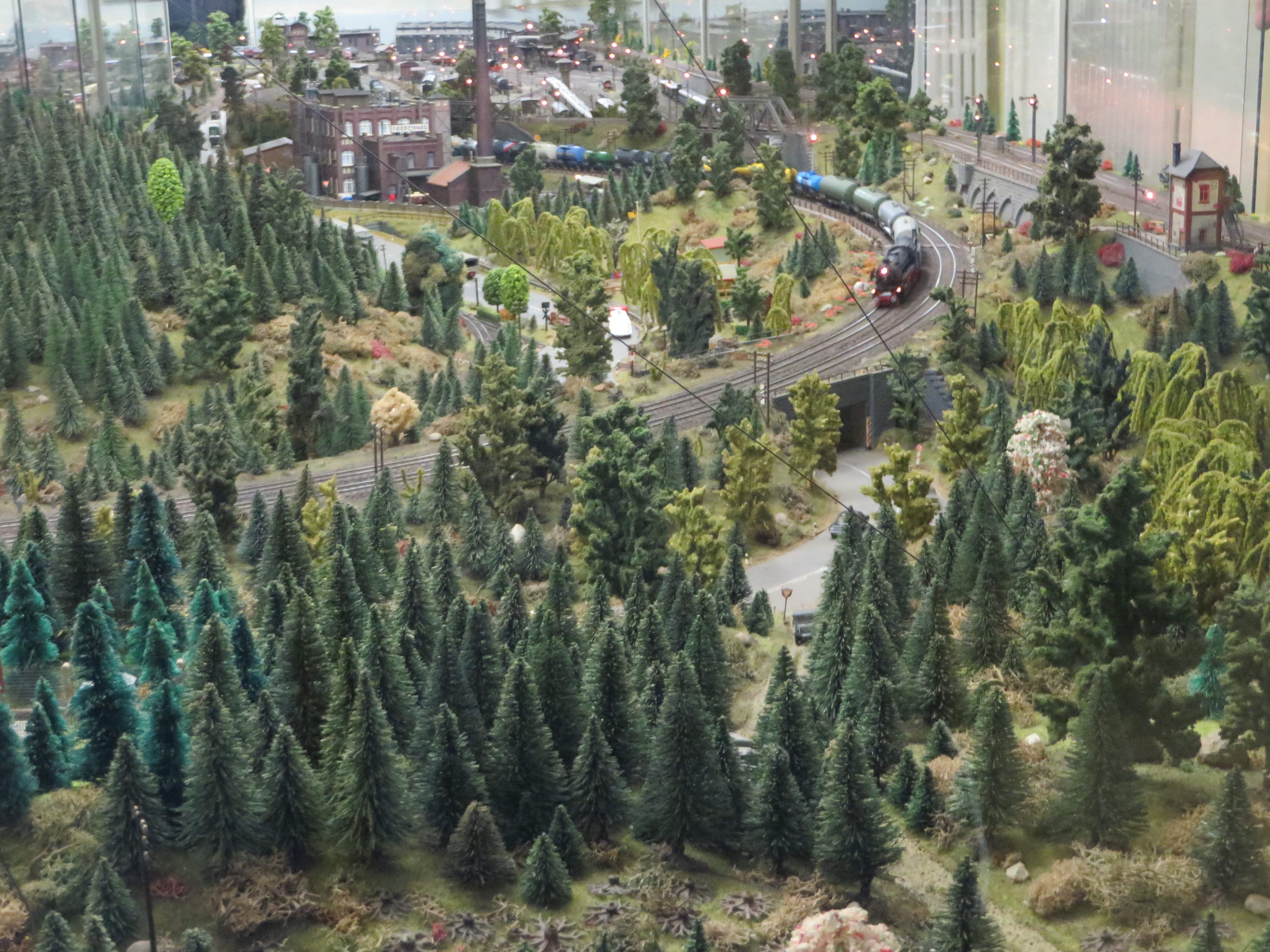 Die Modelleisenbahnaustellung des Modelleisenbahnclubs Flensburg am Bahnhof Flensburg (Flensburg 2014), Bild 003; Die Ausstellung ist von Oktober bis Januar eines Jahres, Sonntags 10:30 Uhr bis 12:30 Uhr, zu besichtigen. Erwachsene zahlen 3,50 Euro und Kinder 2,50 Euro Eintritt (Stand 2014)